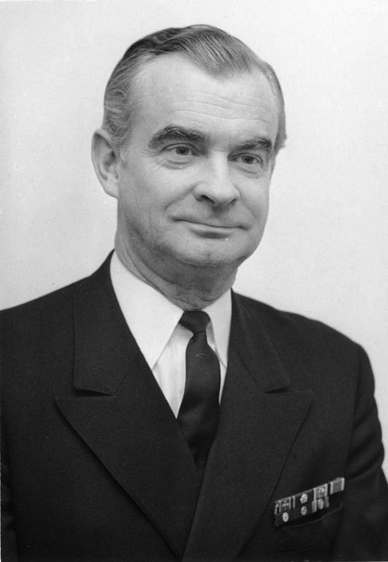 Admiral Zimmermann, Gen. Inspekteur